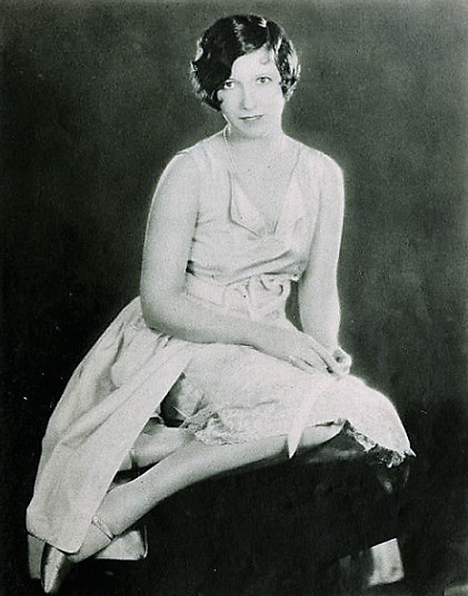 Margaret Morris